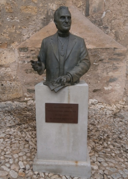 Denkmal vor der Kirche von Montuiri